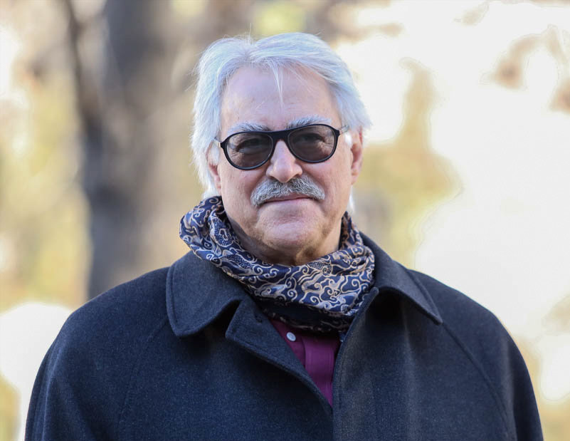 سید جواد طباطبایی در نشست «ایران همین جاست که ایستاده ایم»، خانه اندیشمندان علوم انسانی